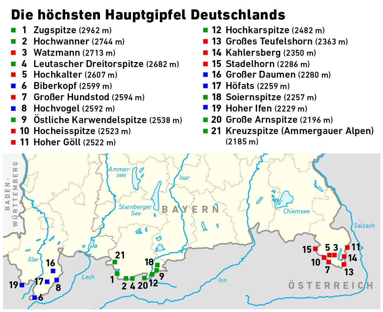 Lage-Schema (Positionen sind nicht lagegenau) der höchsten Hauptgipfel Deutschlands